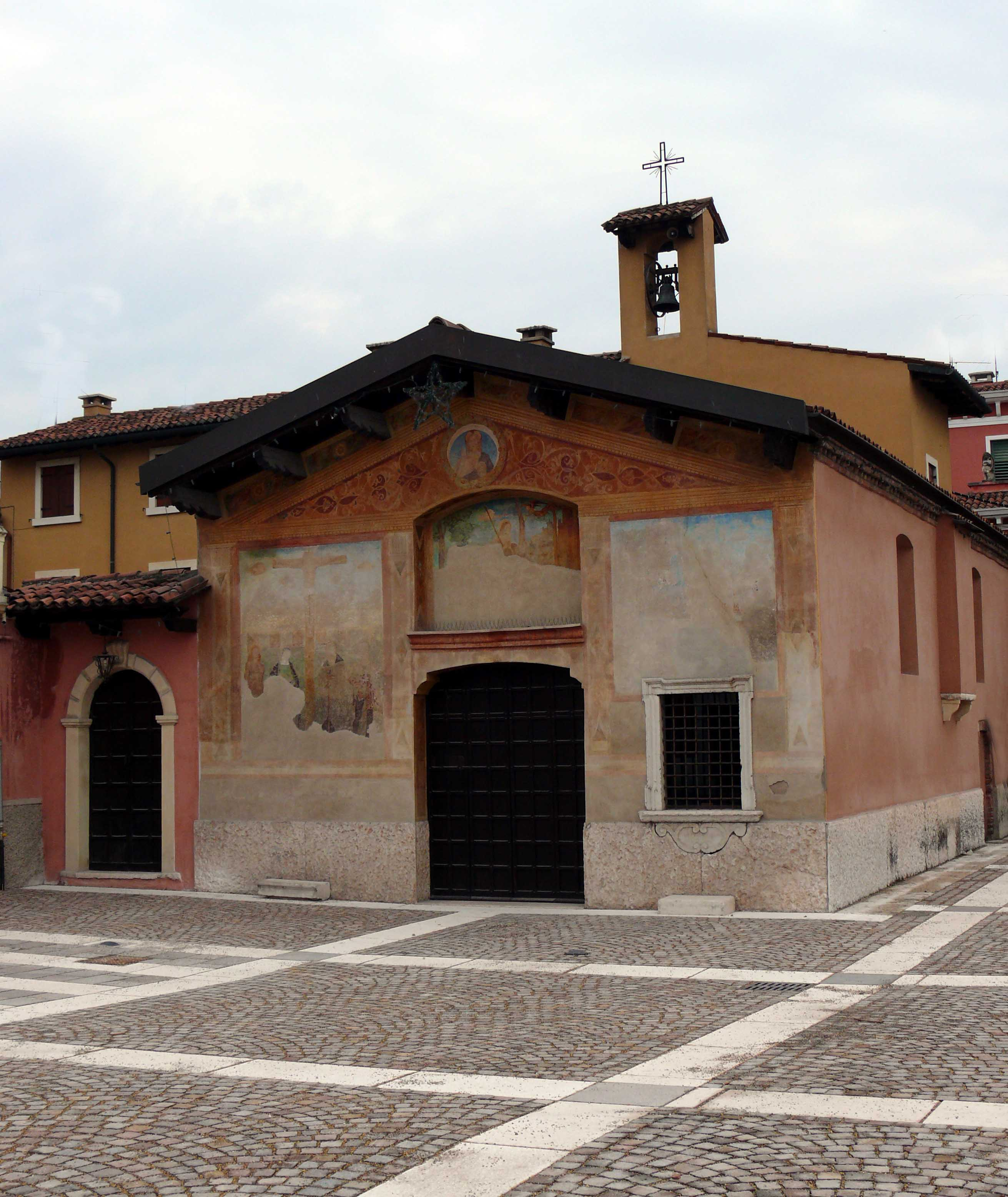 chiesetta di San Rocco a Villafranca di Verona (XV sec.)